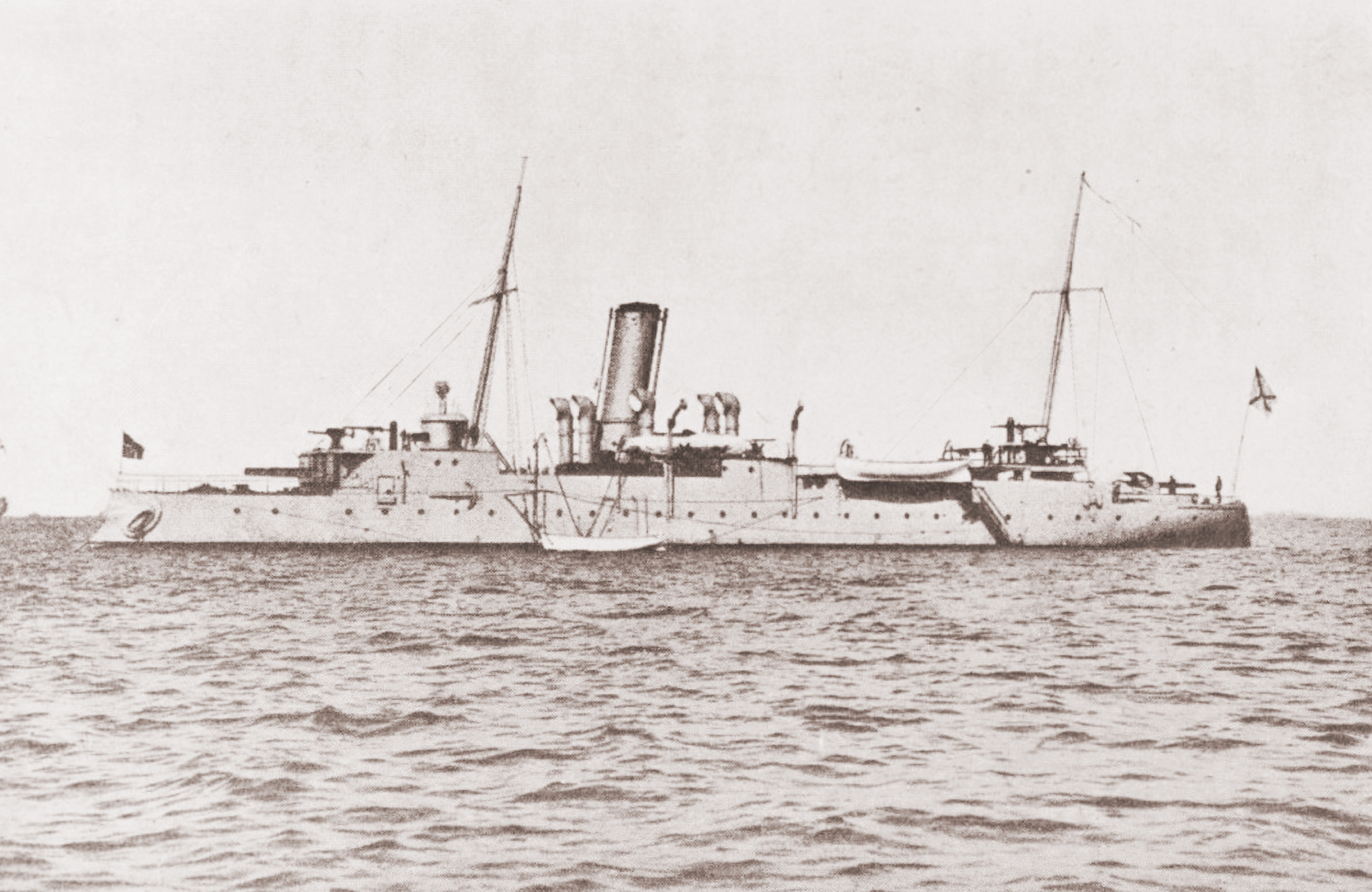 Гремящий на Тихом океане